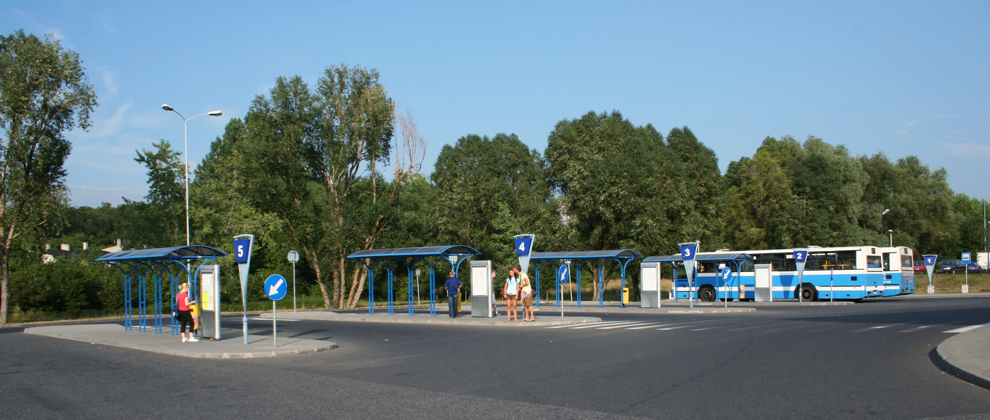 Rybnik, dworzec autobusowy